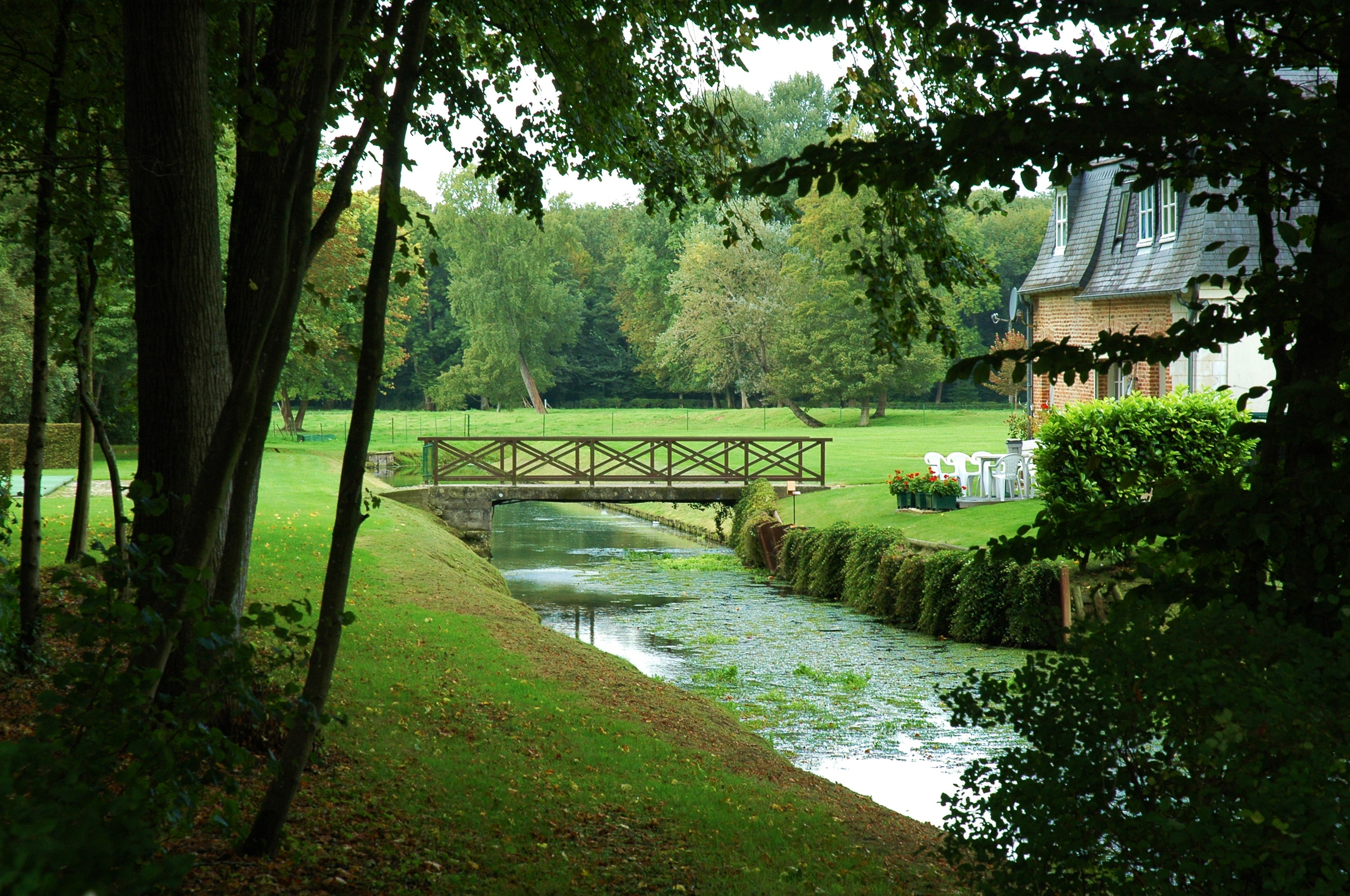 Willeman (Pas-de-Calais, France). Partie Sud du fossé en eau entourant le château (vue depuis la Rue du Château).